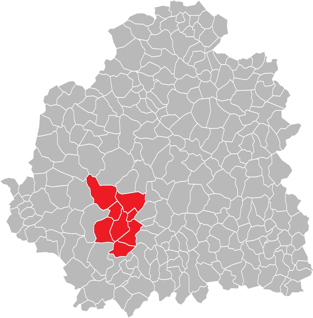 Carte des communes de l'Indre (36) : Le canton de Saint-Gaultier, de 1790 à 2015.